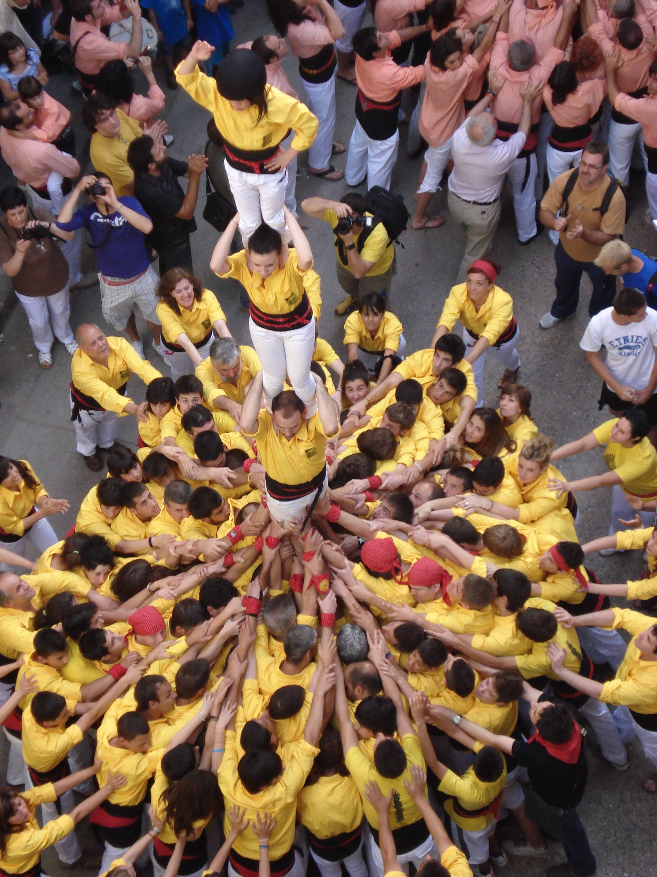 Pilar de 4 dels Castellers de Solsona, realitzat el dia del seu bateig, a la plaça de l'Ajuntament.